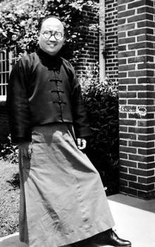 刘湛恩在自家住宅前留影